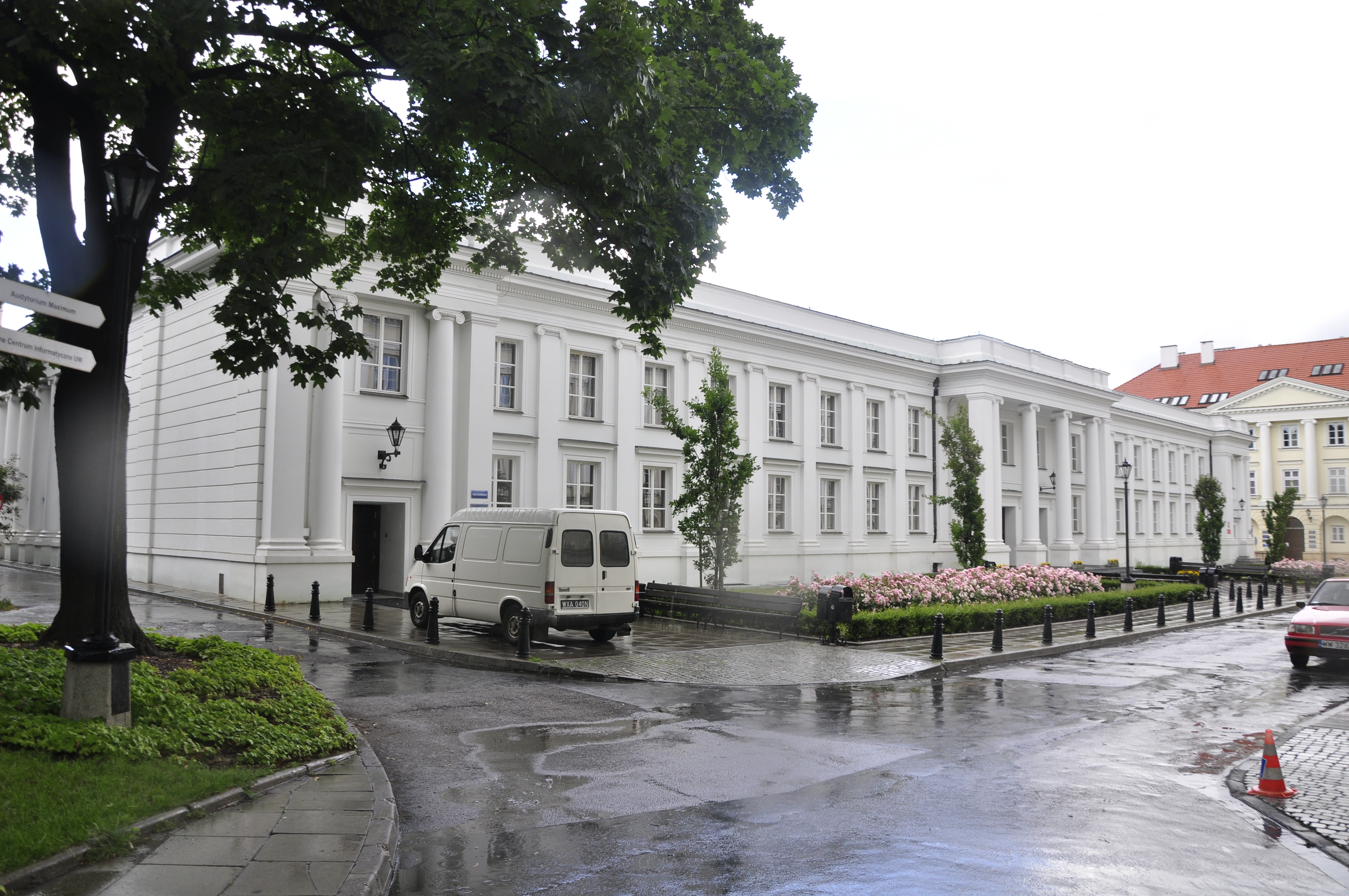 Warschau, Campus der Universität Warschau